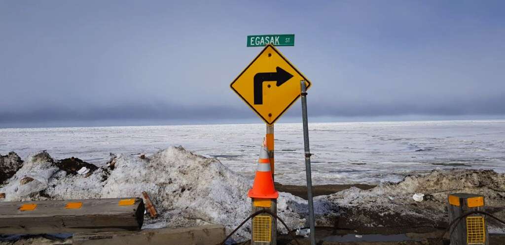 Vista del Mar Glaciar Ártico tal como se ve desde la costanera de Barrow, Alaska